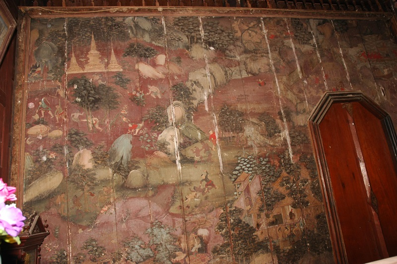 เป็นงานจิตรกรรมสีฝุ่นผสมกาวลงบนพื้นไม้สัก